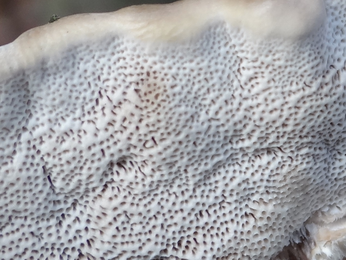 Bjerkandera fumosa